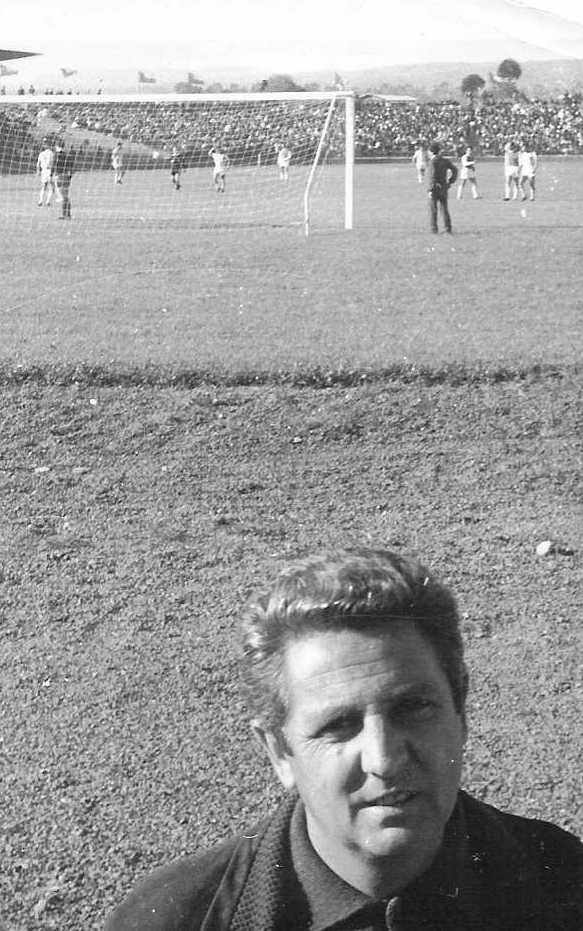 Fernando Riera at the Estadio Municipal de Temuco in Temuco, Araucanía Region, Chile.